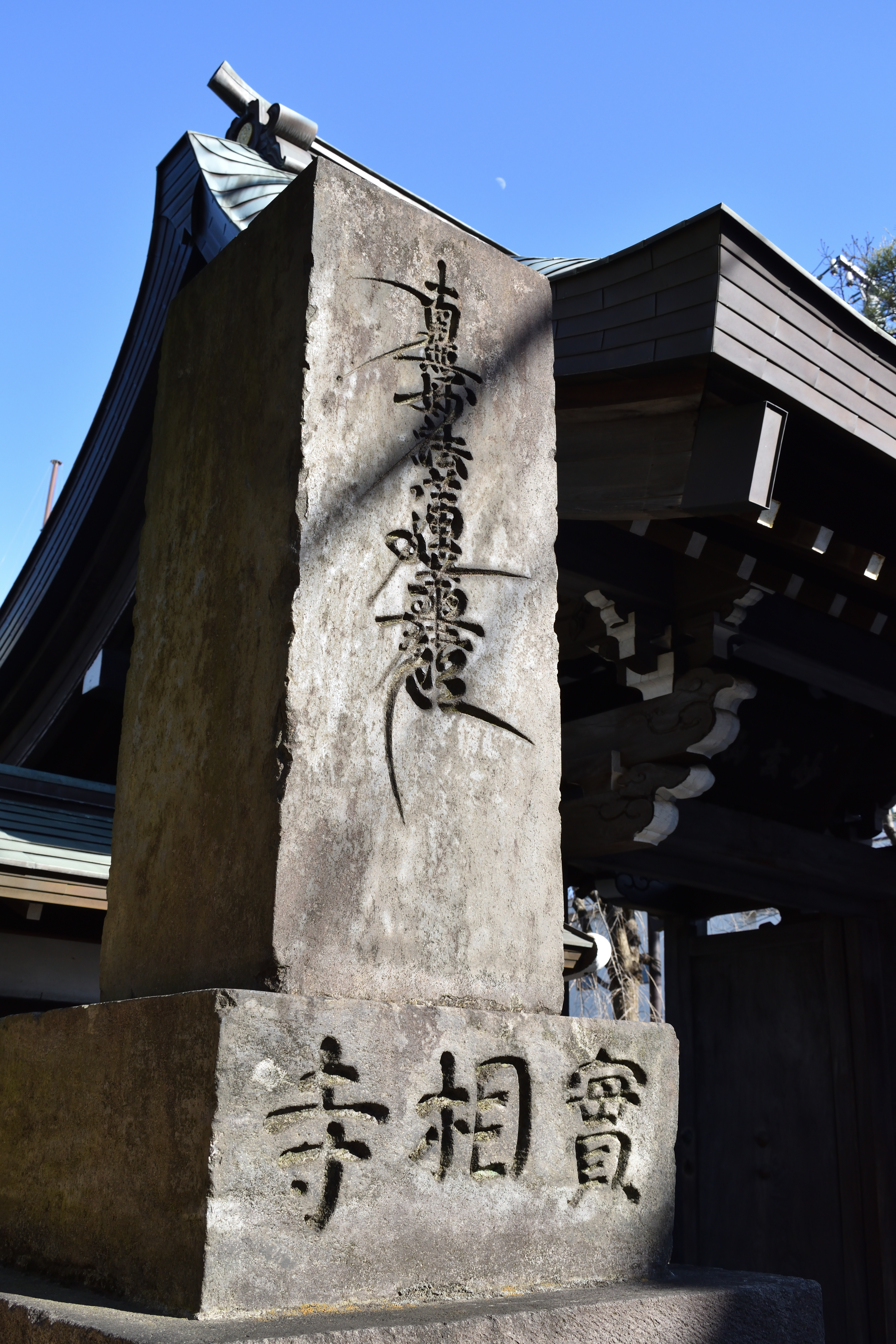 日蓮宗實相寺（東京都大田区池上）の題目石。